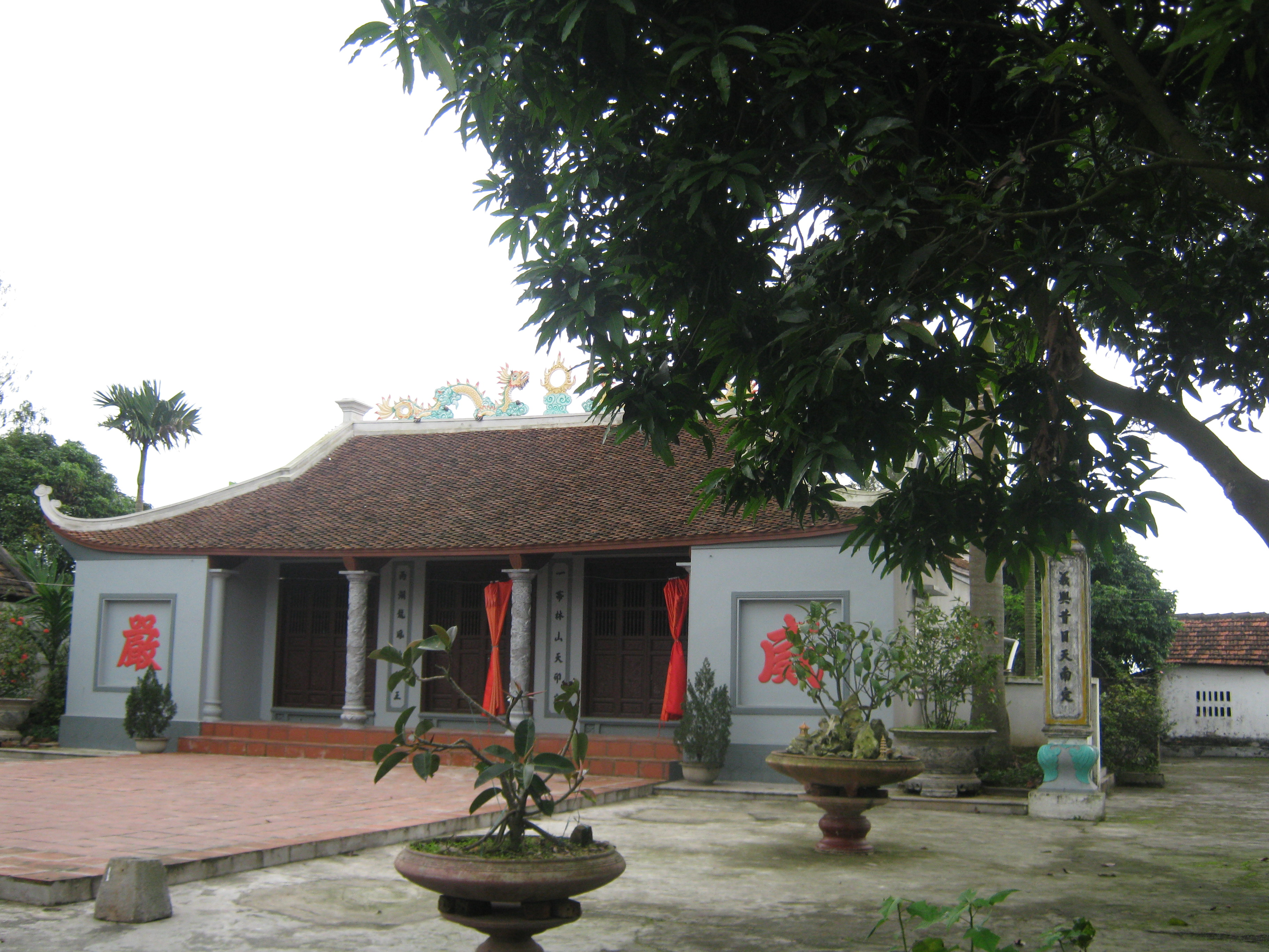 Quần thể di tích đền thờ vua Đinh Tiên Hoàng ở Nam Định